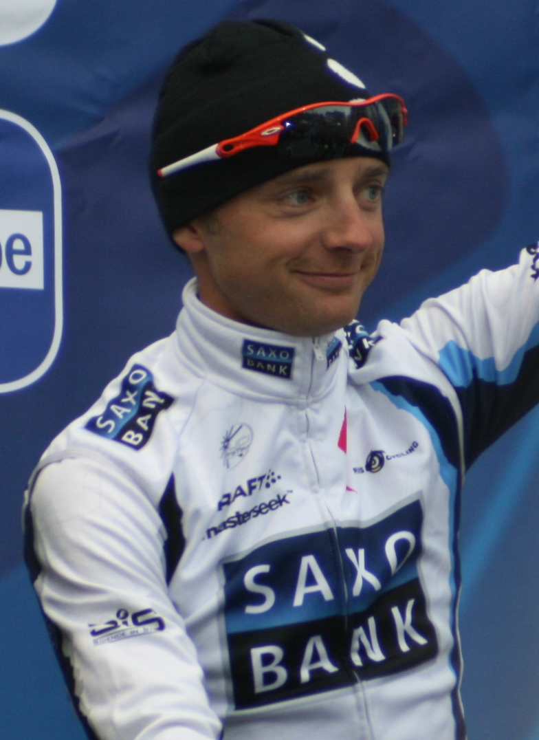 Karsten Kroon au départ du Tour des Flandres 2009